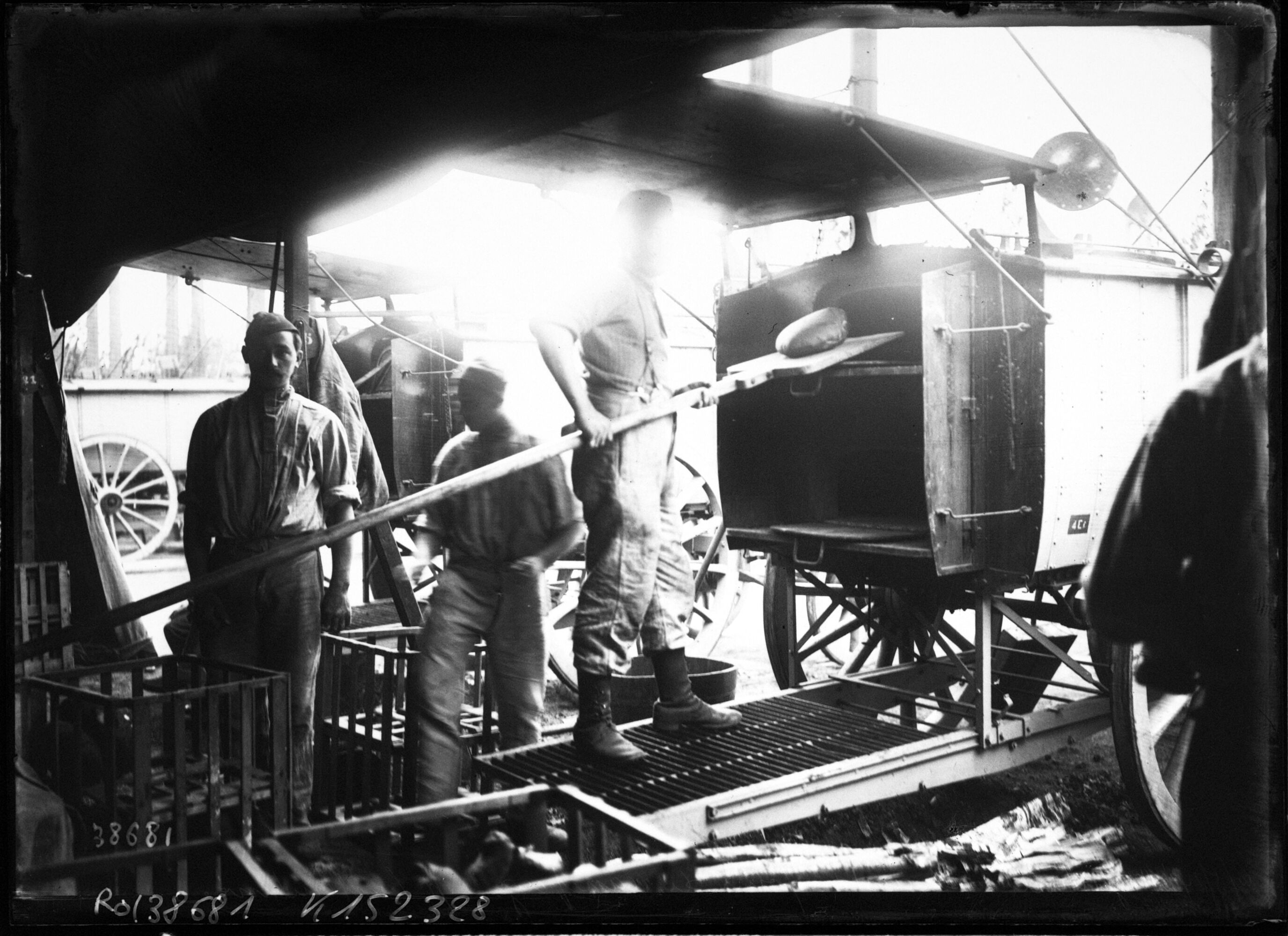 Essai de fours à pain mobile par l'armée à Argenteuil en mai 1914.